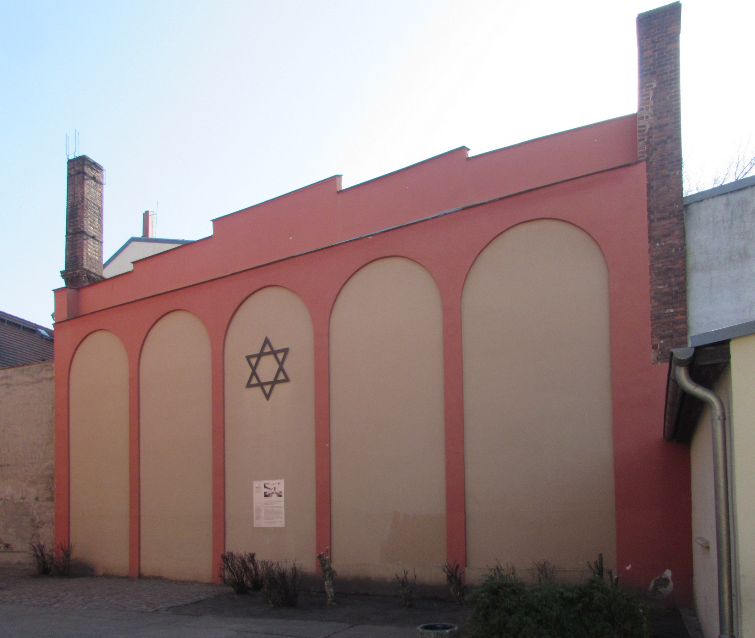 gedenkstätte der ehemalige synagoge in brandenburg an der havel